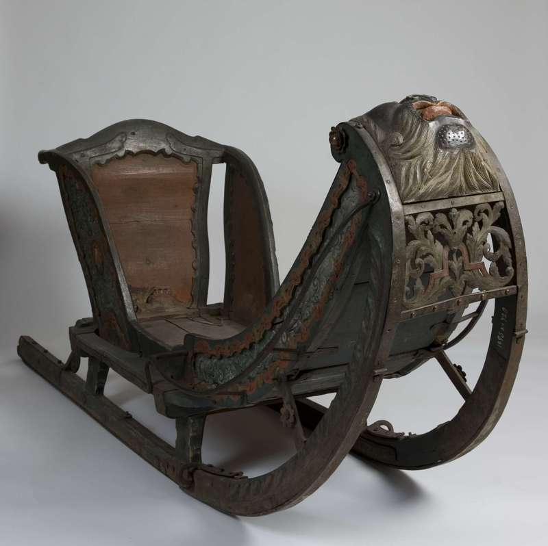 Spissslede fra 1700-årene med en glibb i fornten. Sleden er kommet fra Sør-Fron i Gudbrandsdalen. Lengde 222 cm. Foto Anne-Lise Reinsfelt/Norsk Folkemuseum. NF.1895-0720.